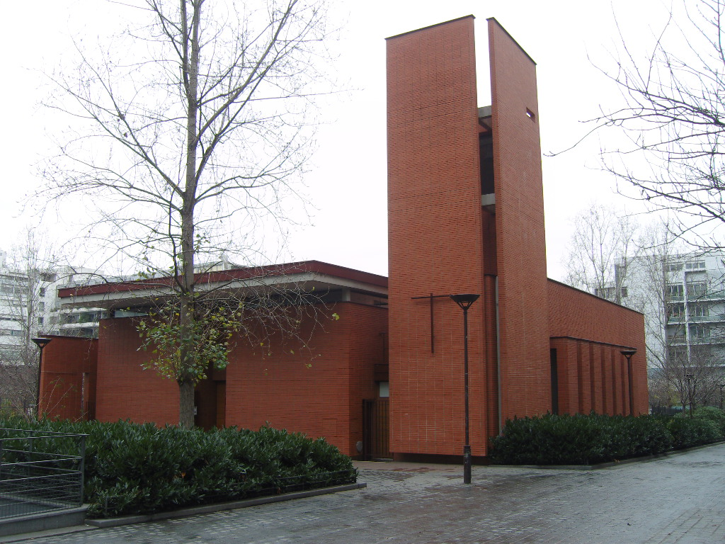 Paris 13e - chapelle Notre-Dame-de-la-Sagesse, rue Abel Gance, quartier Paris-Rive-Gauche